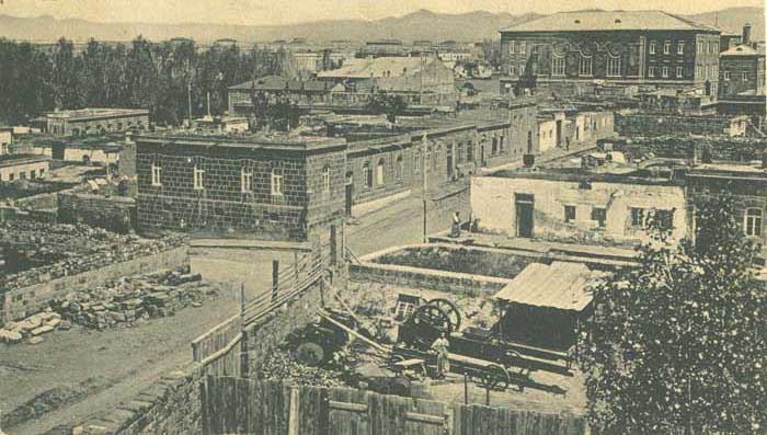 Ալեքսանդրապոլ, 19-րդ դար: Քաղաքի հյուսիսային հատվածի ընդհանուր տեսարանը